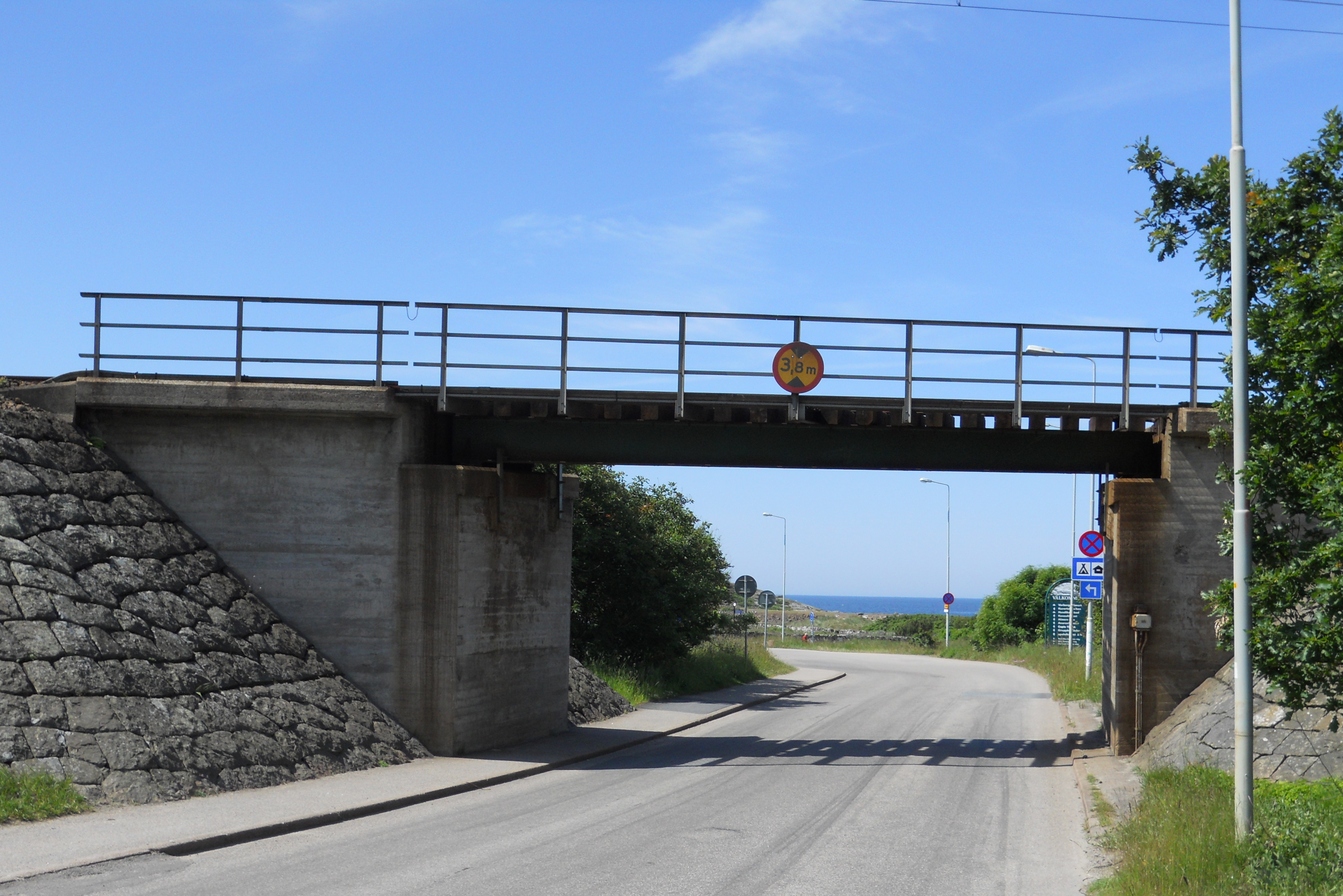 Järnvägsviadukten över Sanatorievägen vid Kåsa i Varberg.